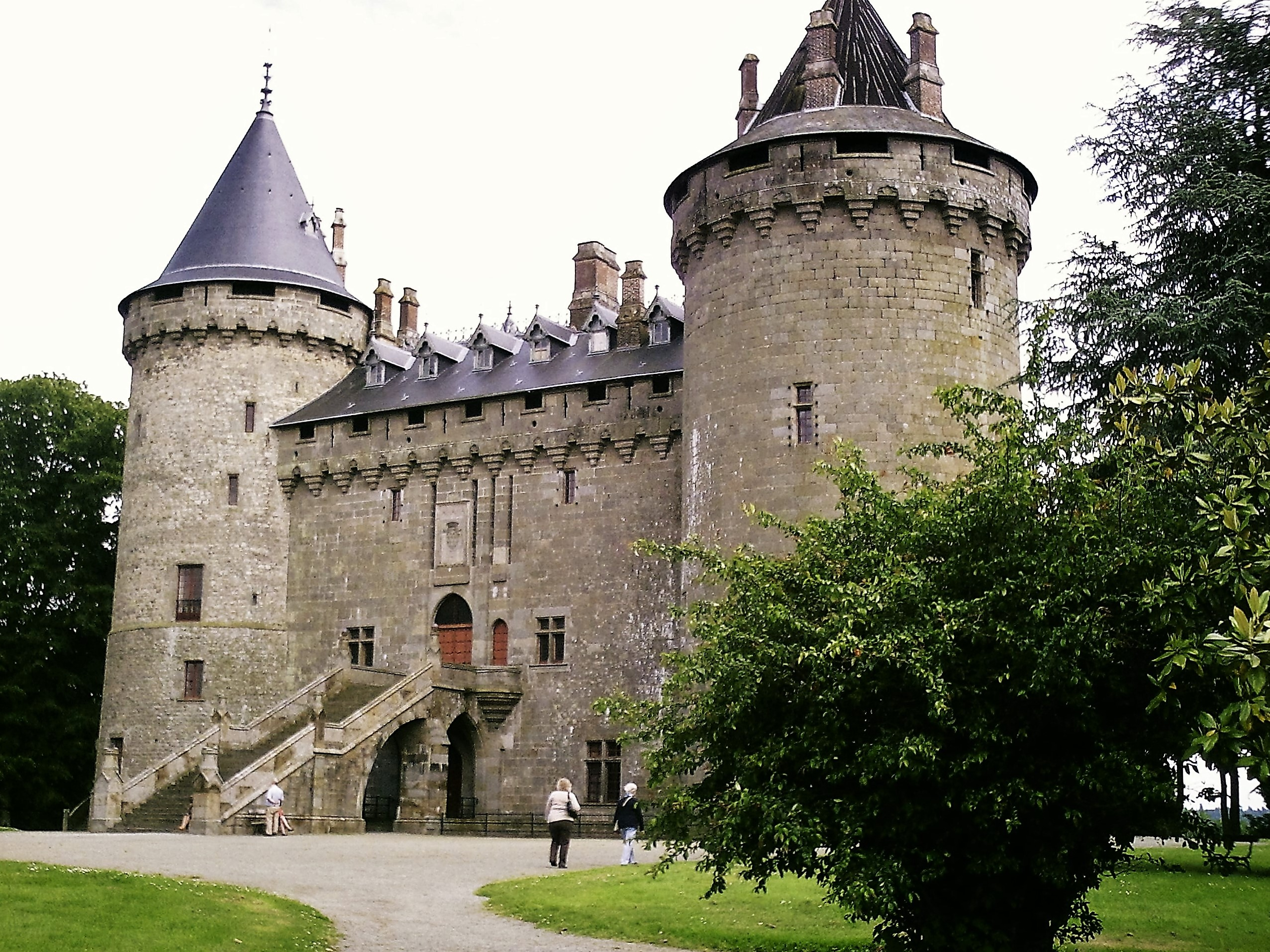 Die bretonische Burg in Combourg, wo Francoise René Chateaubriand einen Teil seiner Jugend verbrachte.